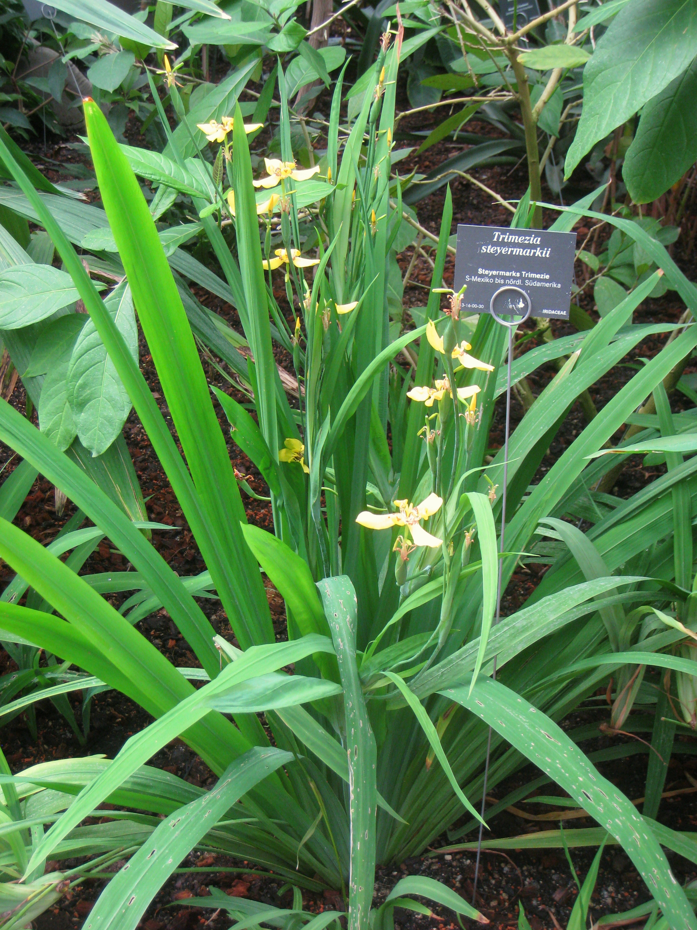 Trimezia steyermarkii specimen in the Botanischer Garten, Berlin-Dahlem (Berlin Botanical Garden), Berlin, Germany.